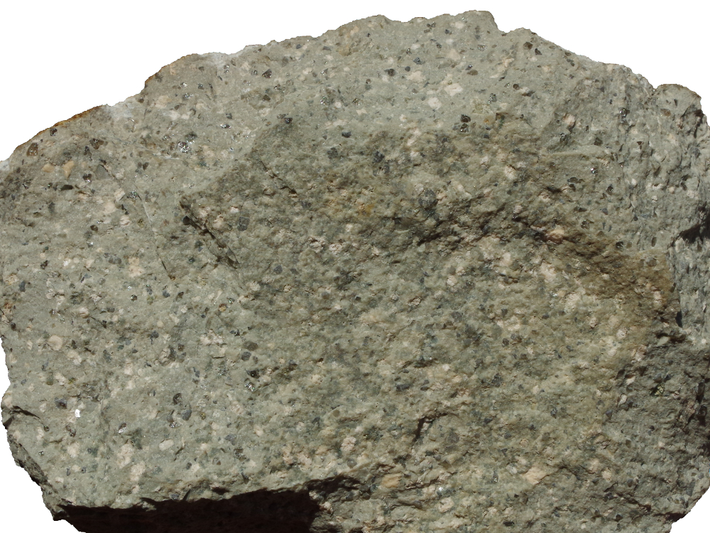 Vzorek z lomu u Těškova na Rokycansku. Skutečná šířka záběru je 12 cm.